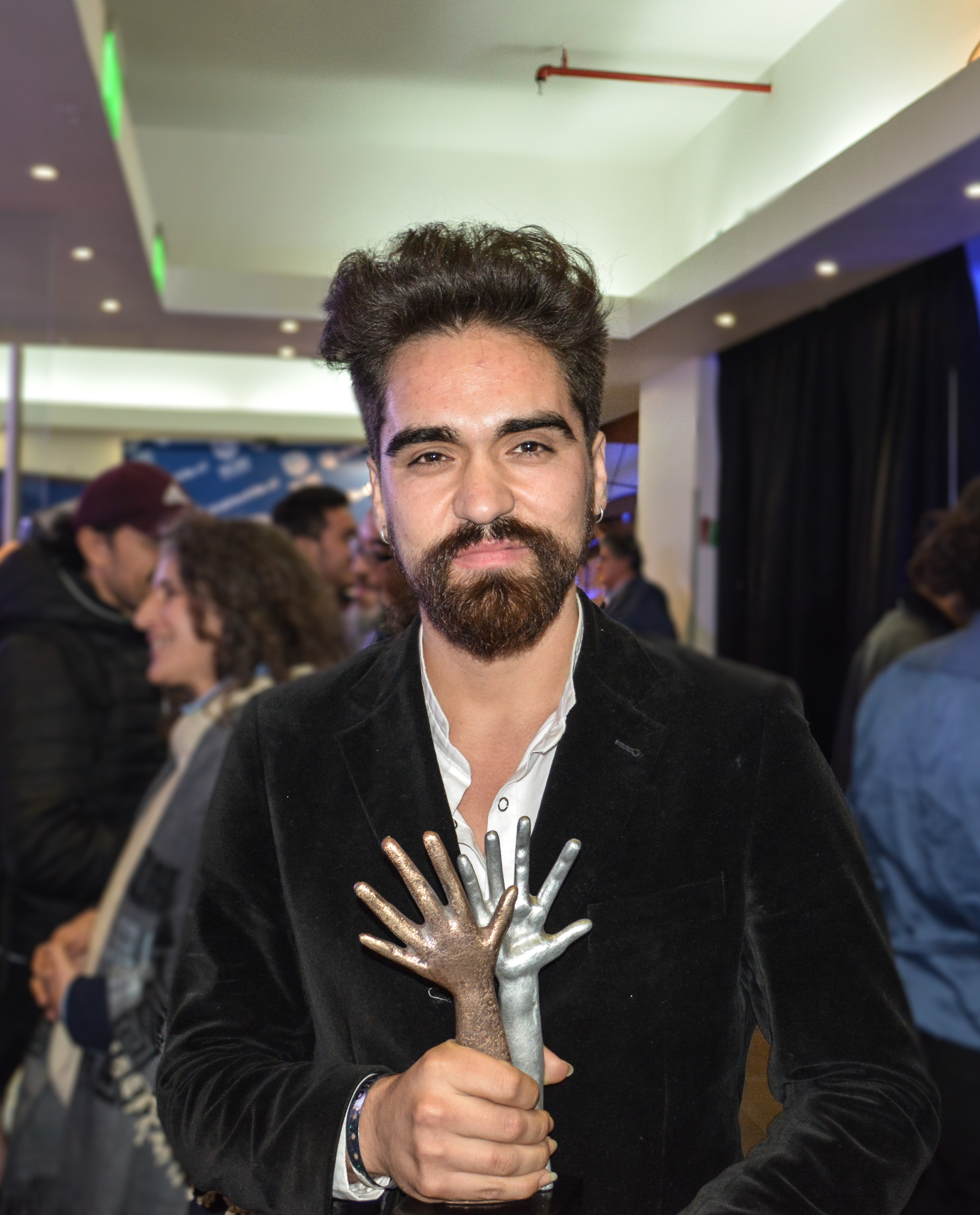 Premios Pulsar 2017